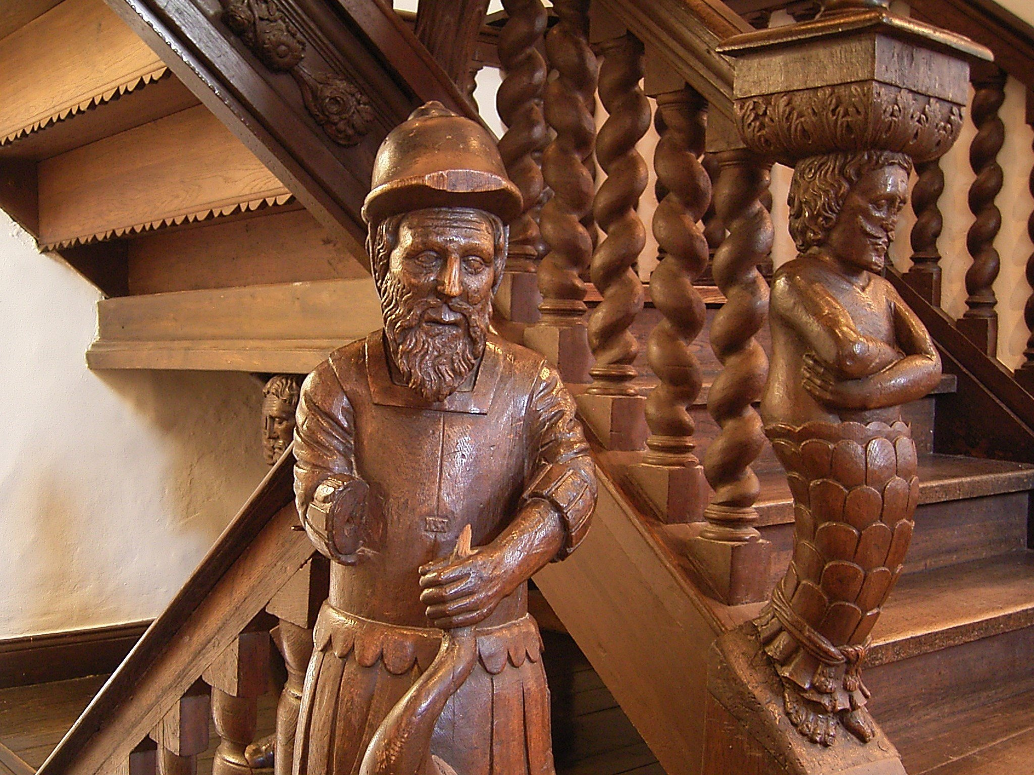 Haus Kemnade in Hattingen - Blankenstein